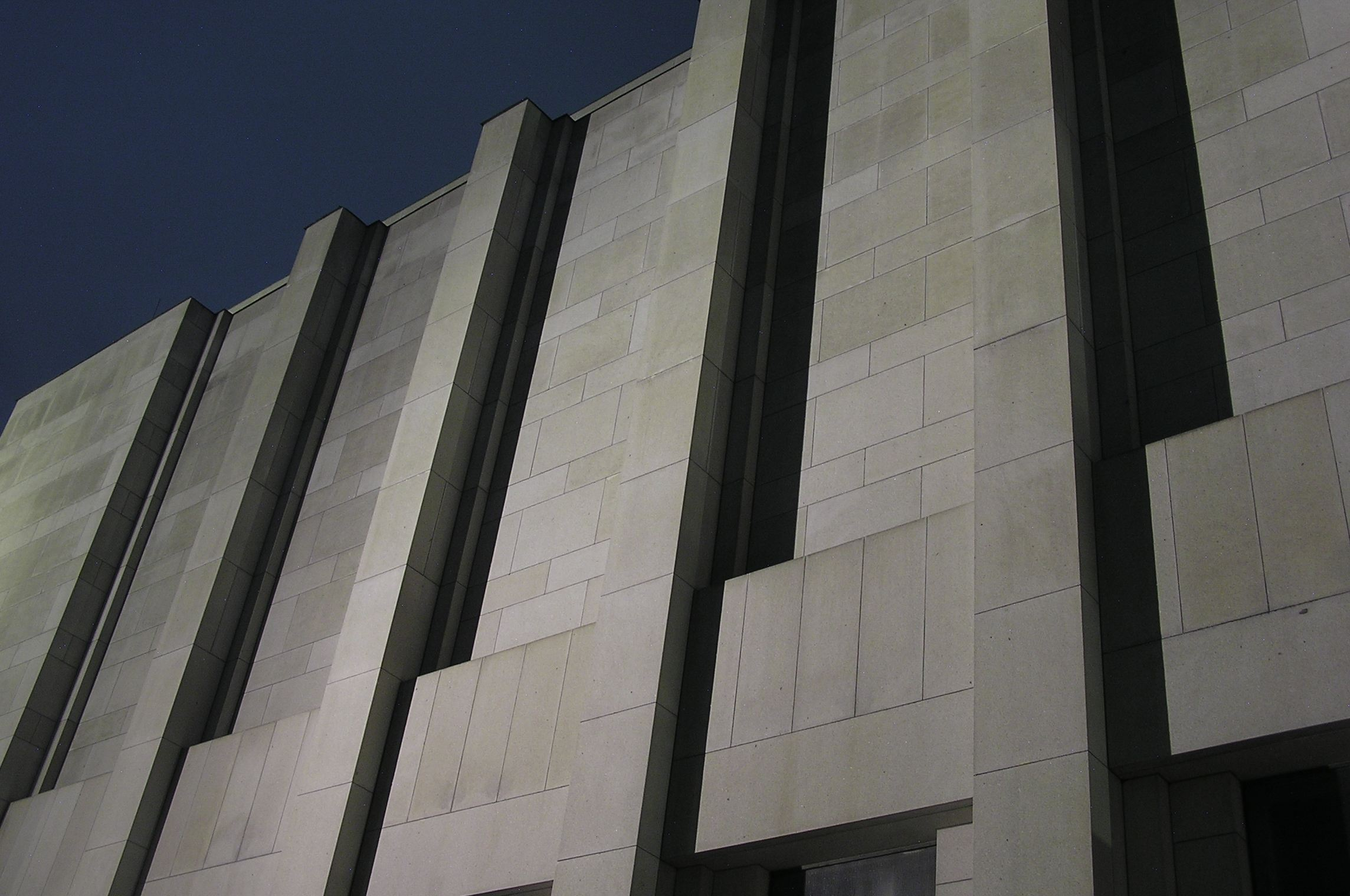 Památník národního osvobození na Vítkově.